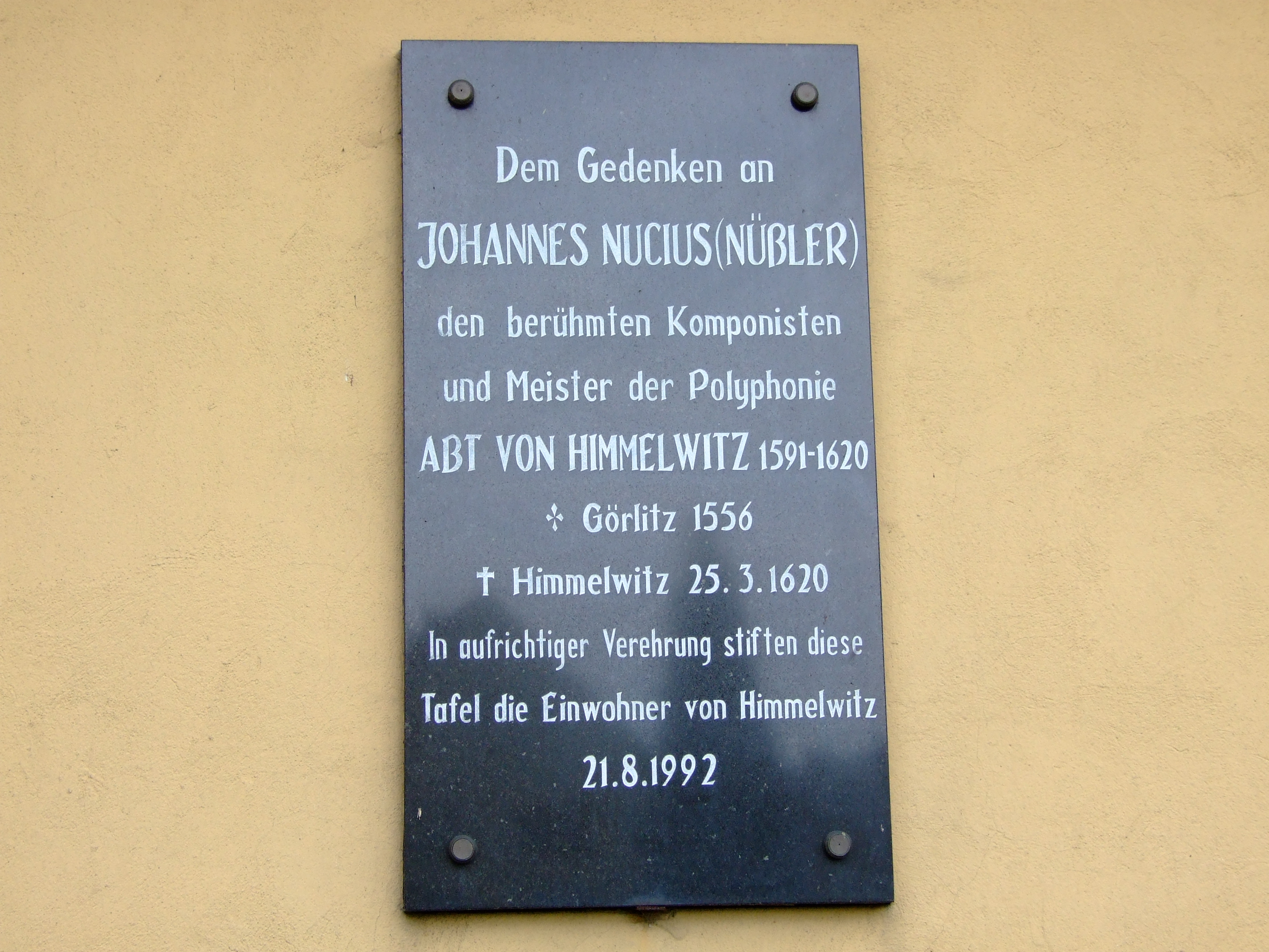 Kościół Wszystkich Świętych w Jemielnicy - tablica pamiątkowa